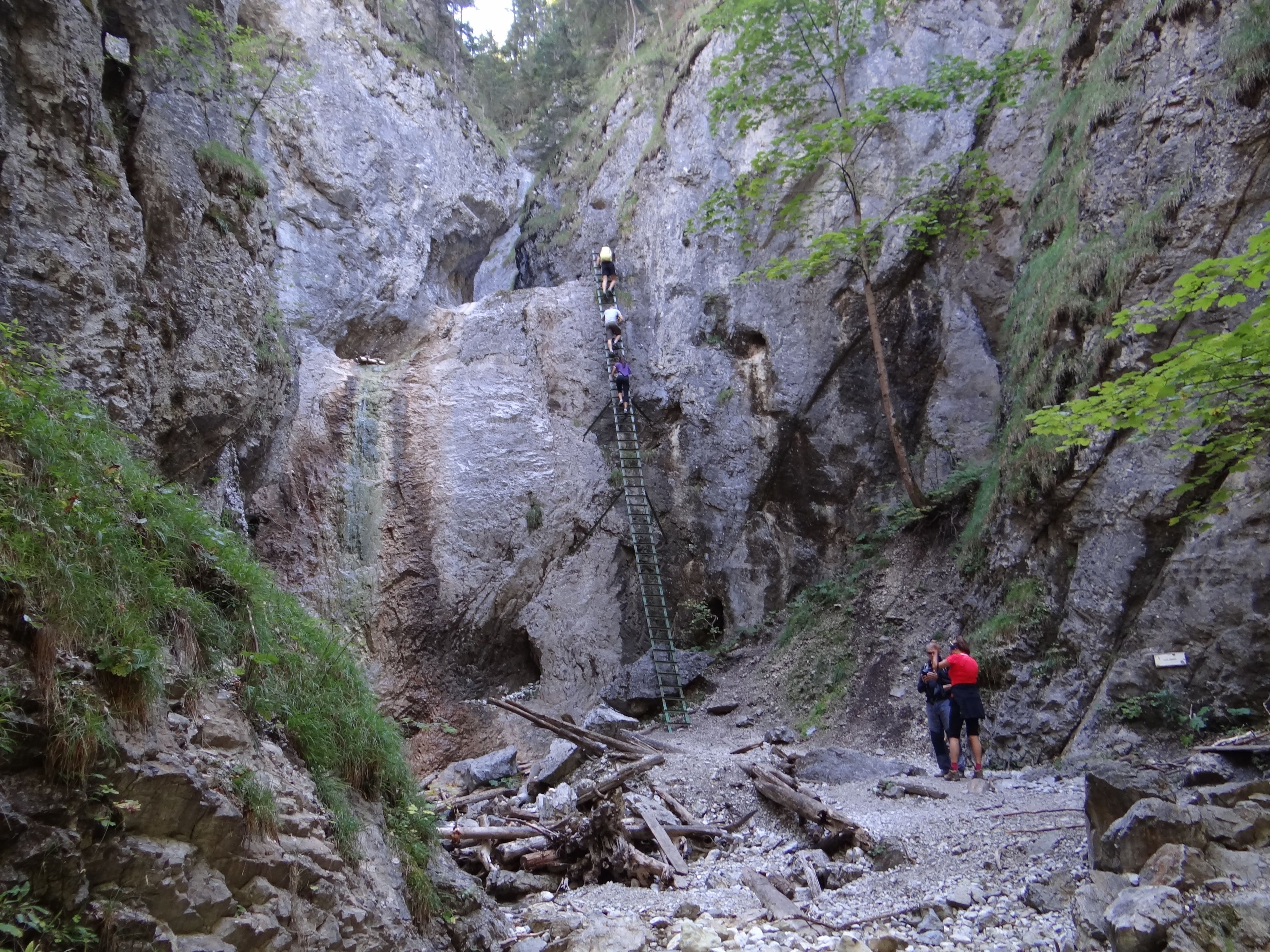 Piecky